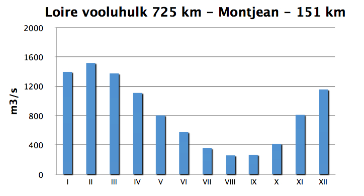 Loire jõe hüdrograaf